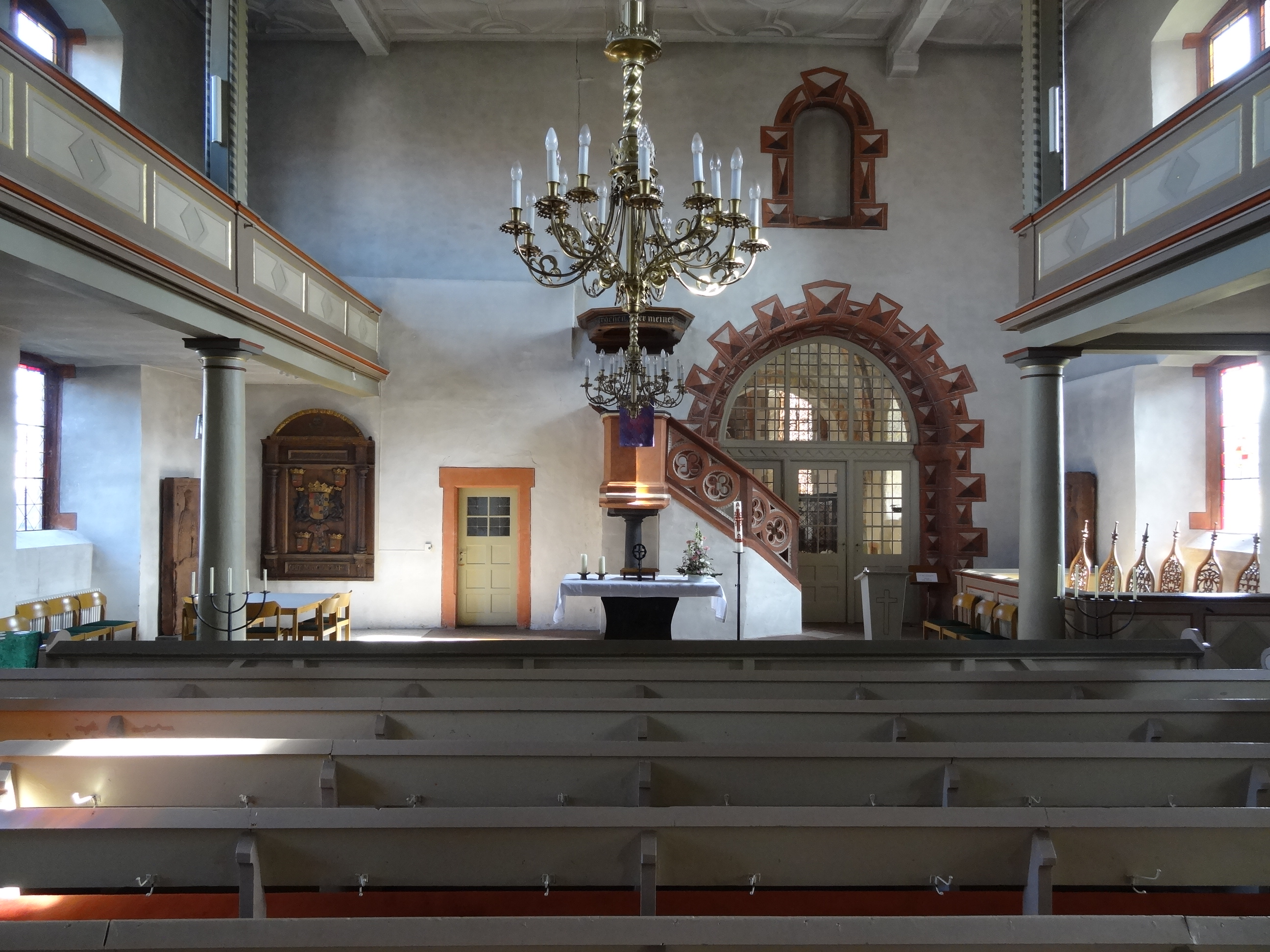 Evangelische Stadtkirche Hungen